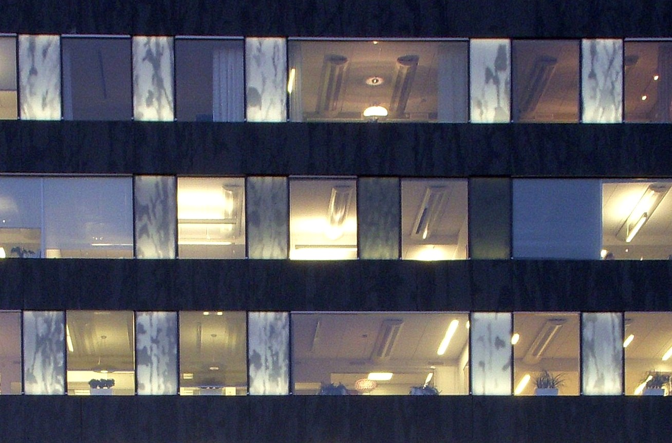 Åhlénshuset Östermalmstorg, fasaddetalj fyra provplattor med olika mörkhetsgrad (i bildmitt)